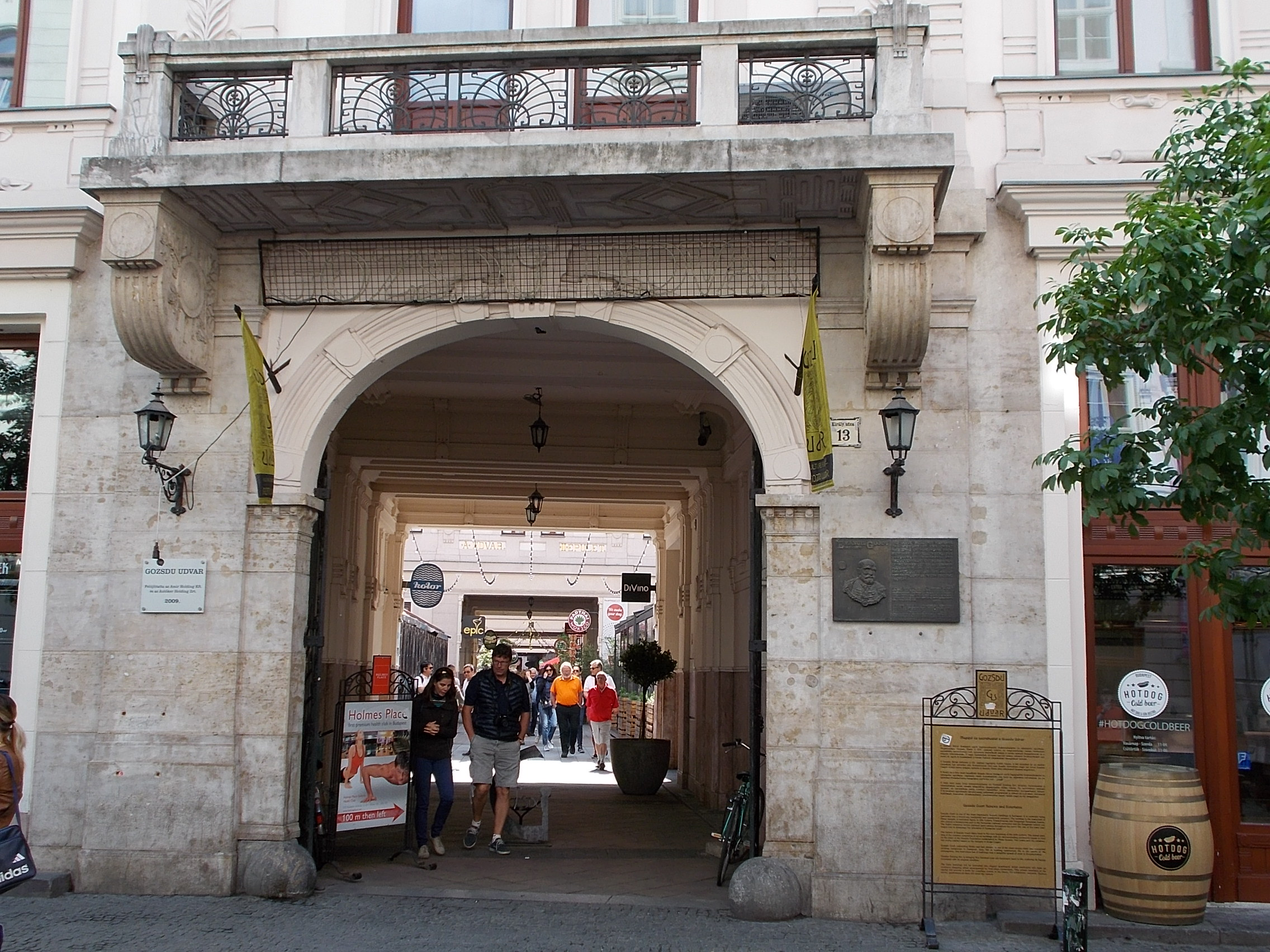 Gozsdu-udvar. Király utca felől. Gozsdu emléktábla. Épült 1901-1902 között, tervező Czigler Győző. Műemlék ID 840 - Erzsébetváros, Király utca 13., Dob utca 16